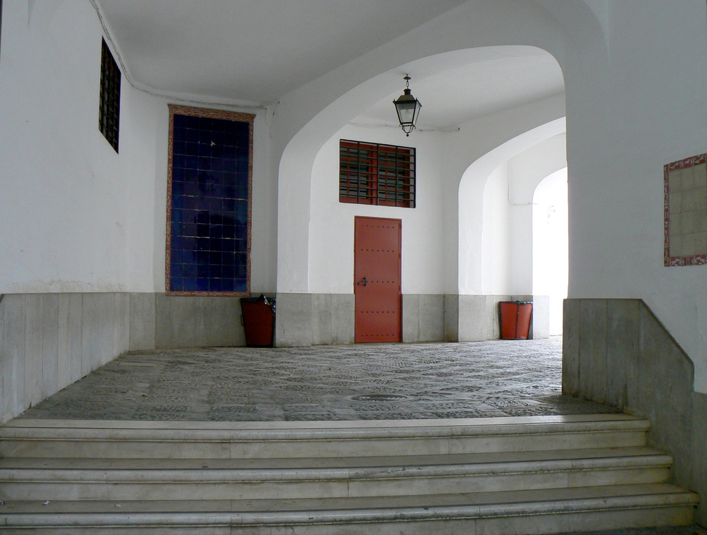 Maestranza de Sevilla